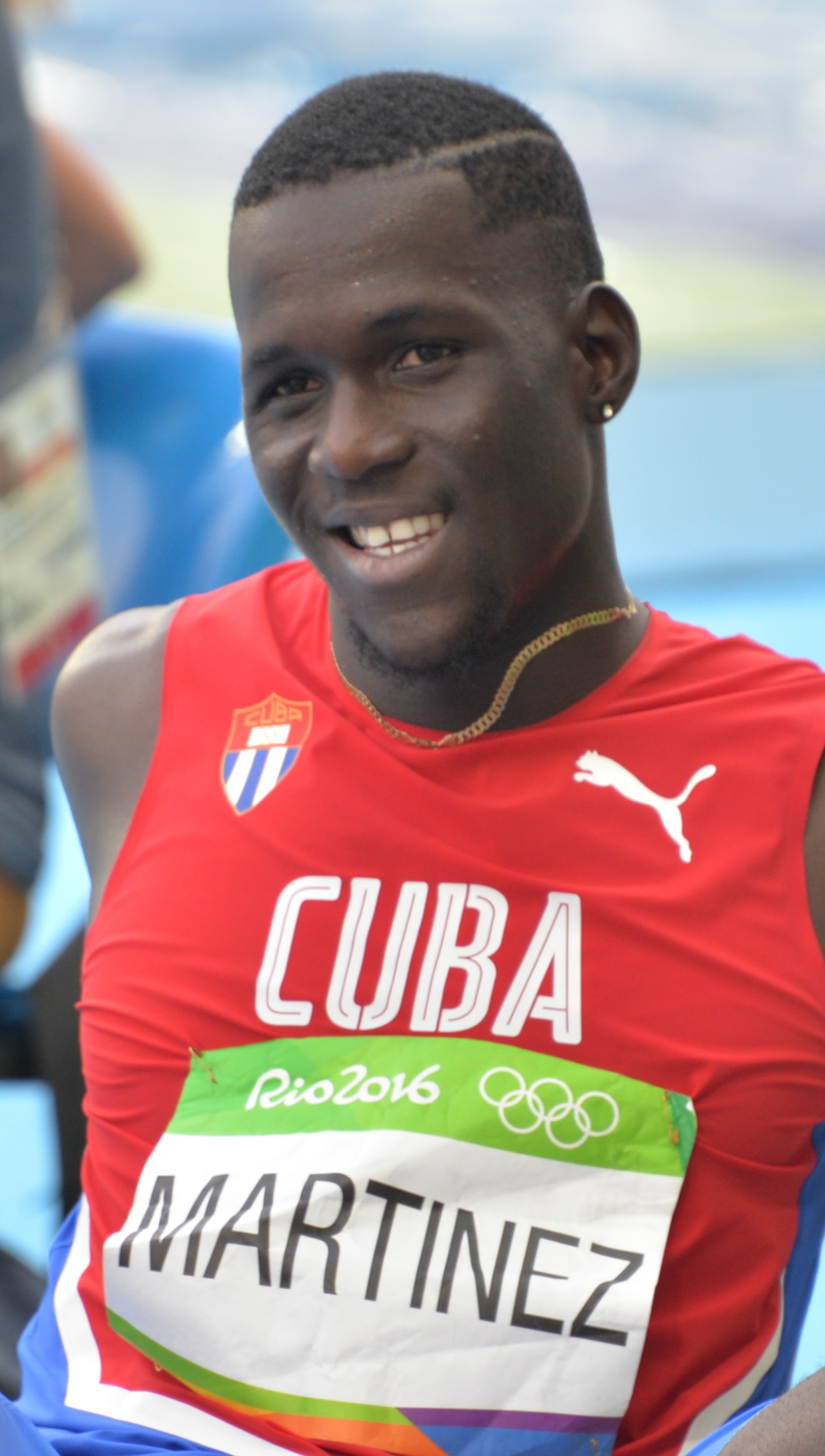 Lázaro Martínez au concours du triple saut à Rio 2916